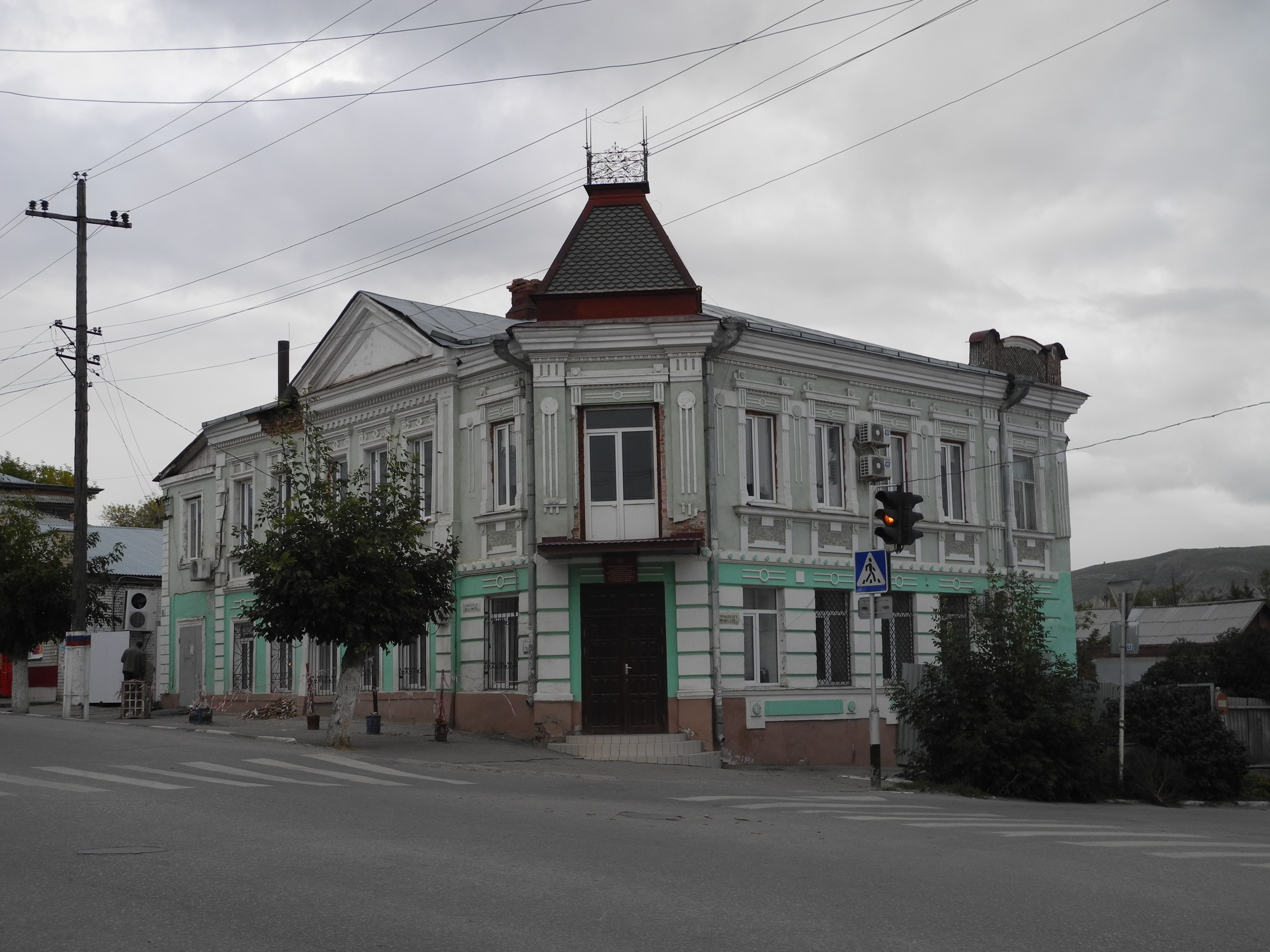 Здание аптеки Фогеля (Саратовская область, Вольск, Коммунистическая улица, 16)